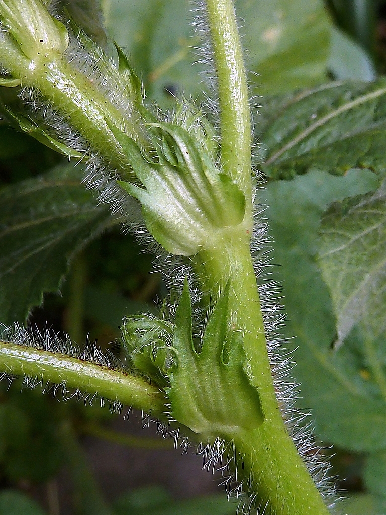 Alcea rosea (Malva real): Estípulas laciniadas - Cultivado/ornamental, Calle Brescia, Parque de las Avenidas, Madrid (España).